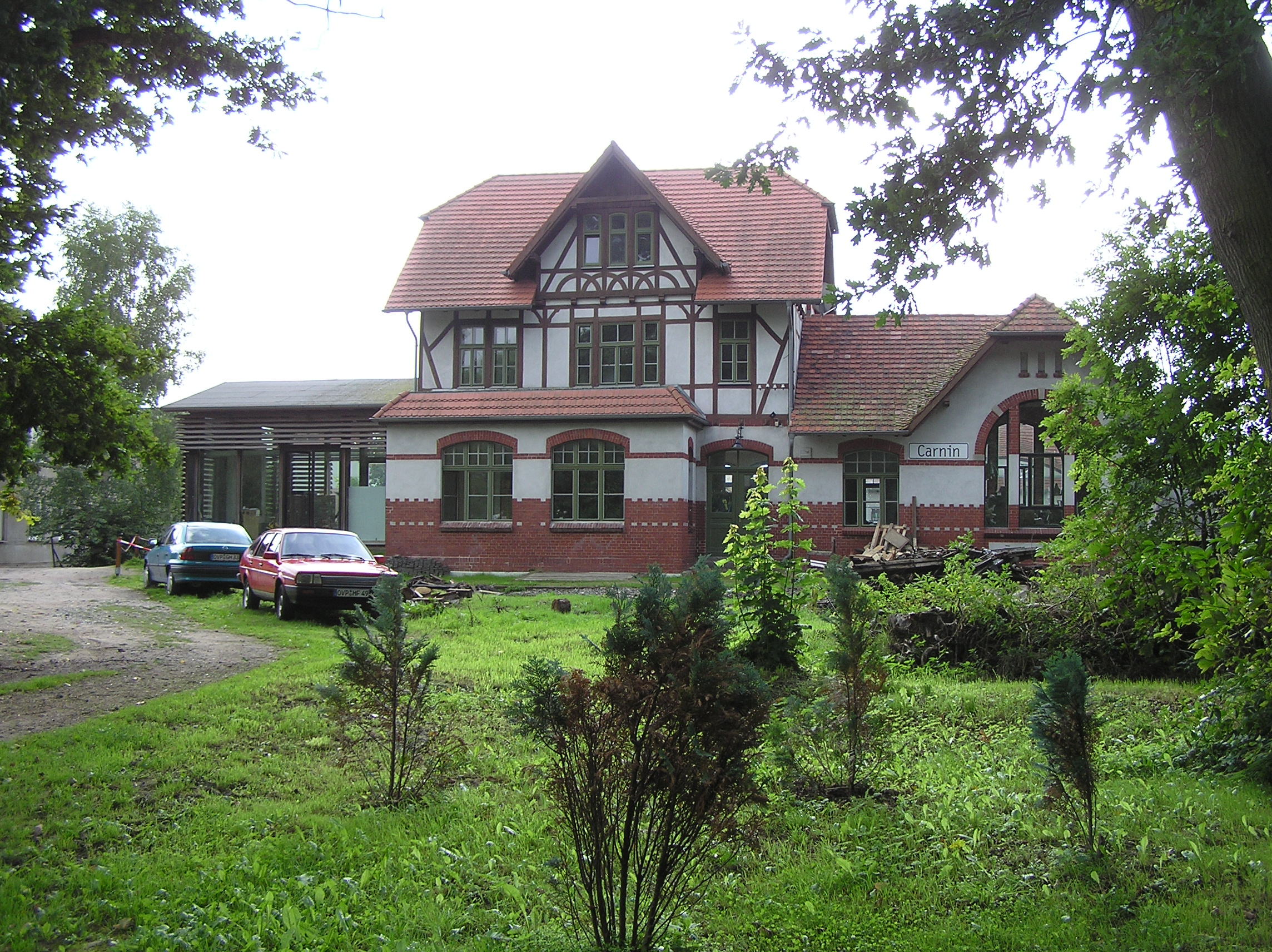 Der alte Bahnhof in Karnin (Stillgelegt - alter Stationsname: Carnin). Das ehemalige Empfangsgebäude des Bahnhofs Karnin – in alter Schreibweise noch mit C.